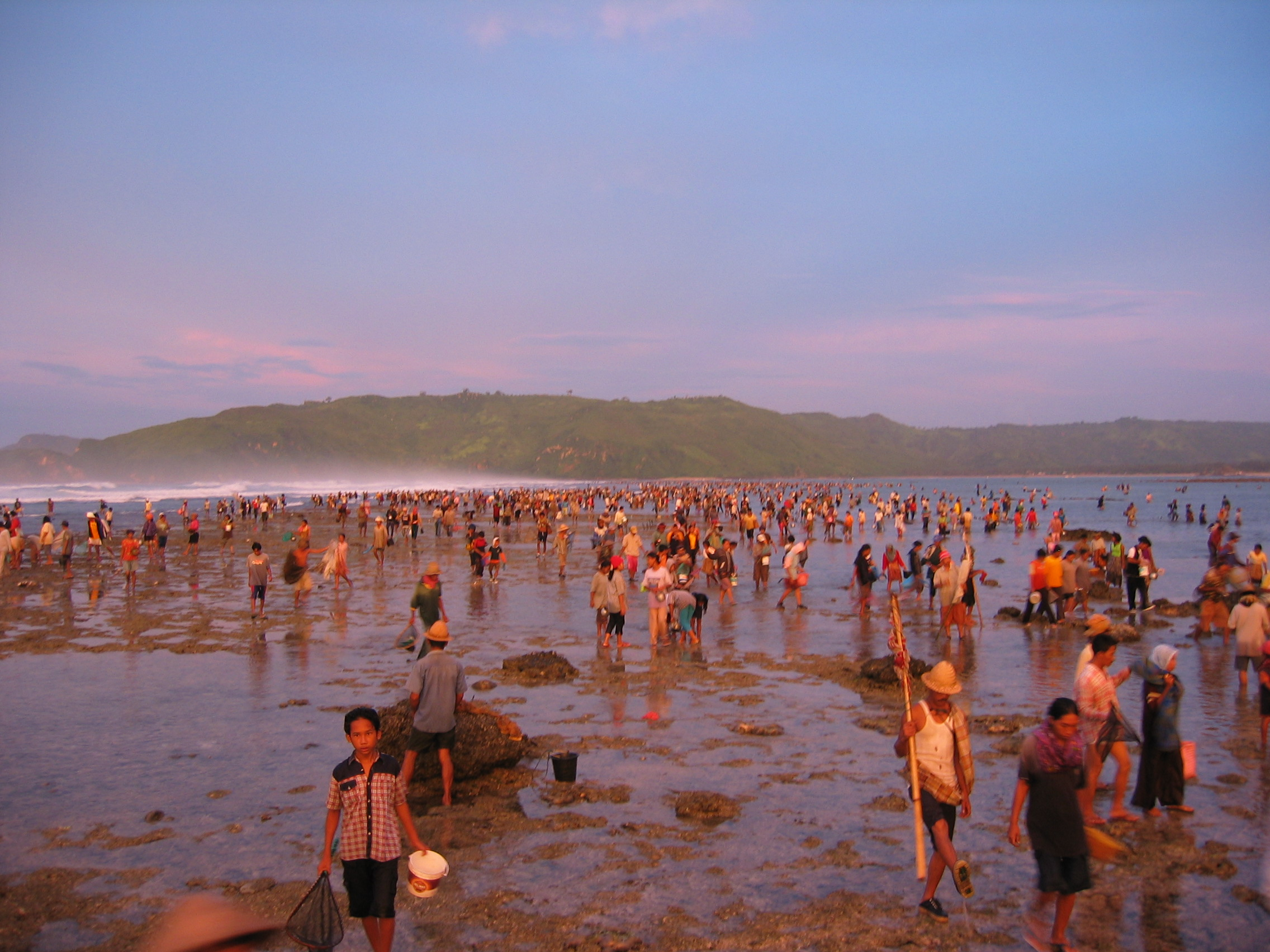 すっかり明けてまだ「ニャレ」探索中